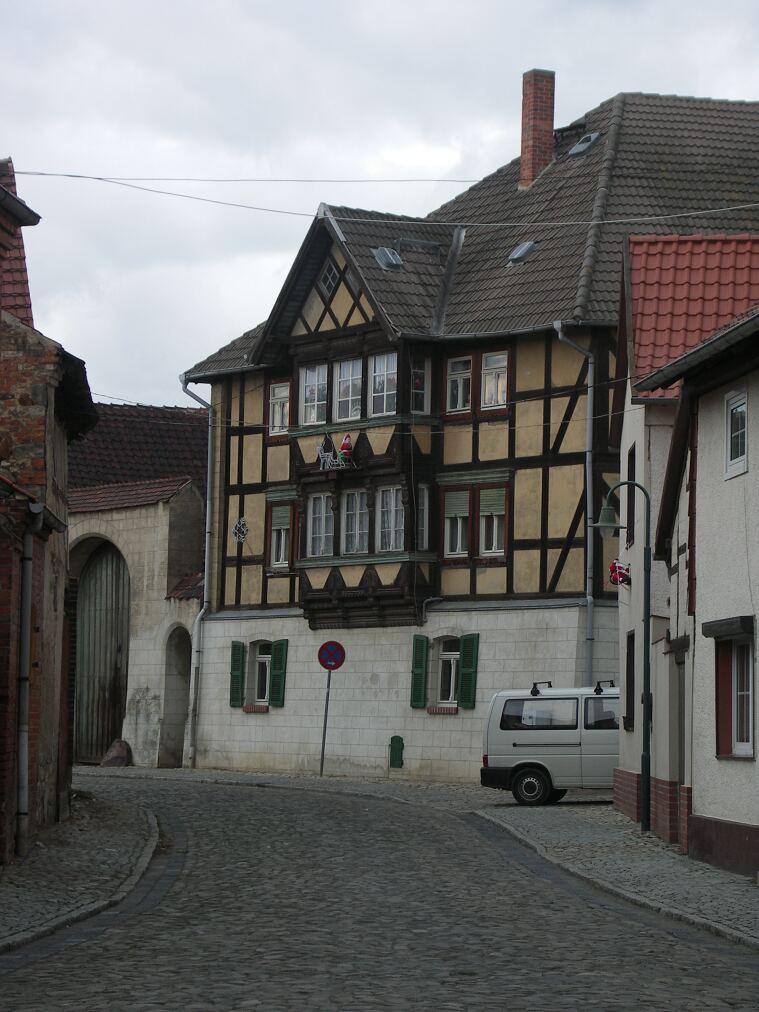 Ditfurt, altes Speicherhaus